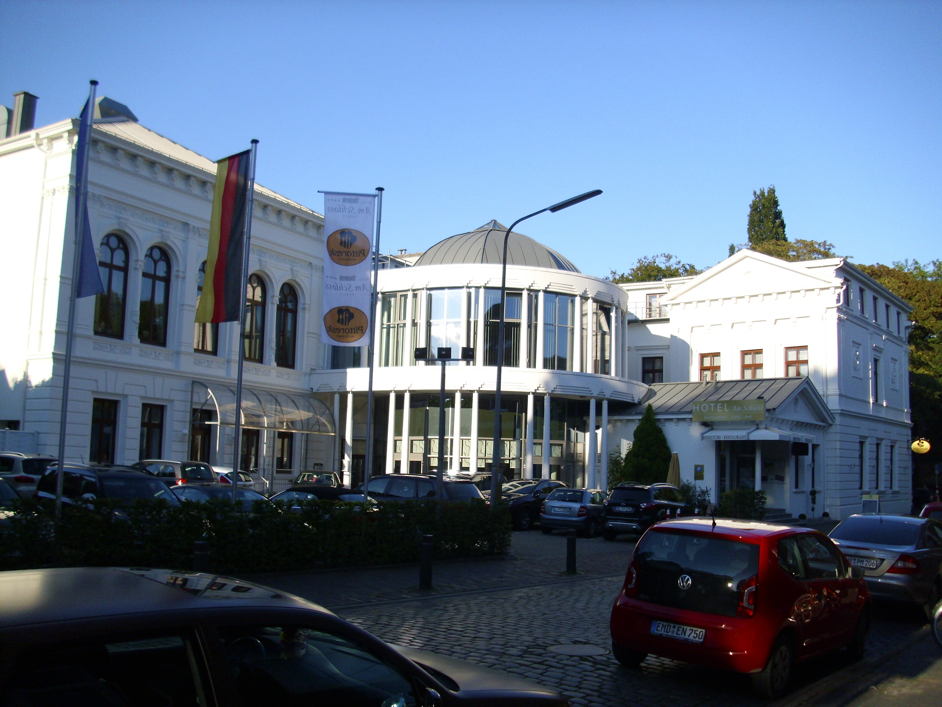 Das Hotel am Schloss (früher Piqueurhof) in Aurich, Ostfriesland, im September 2015